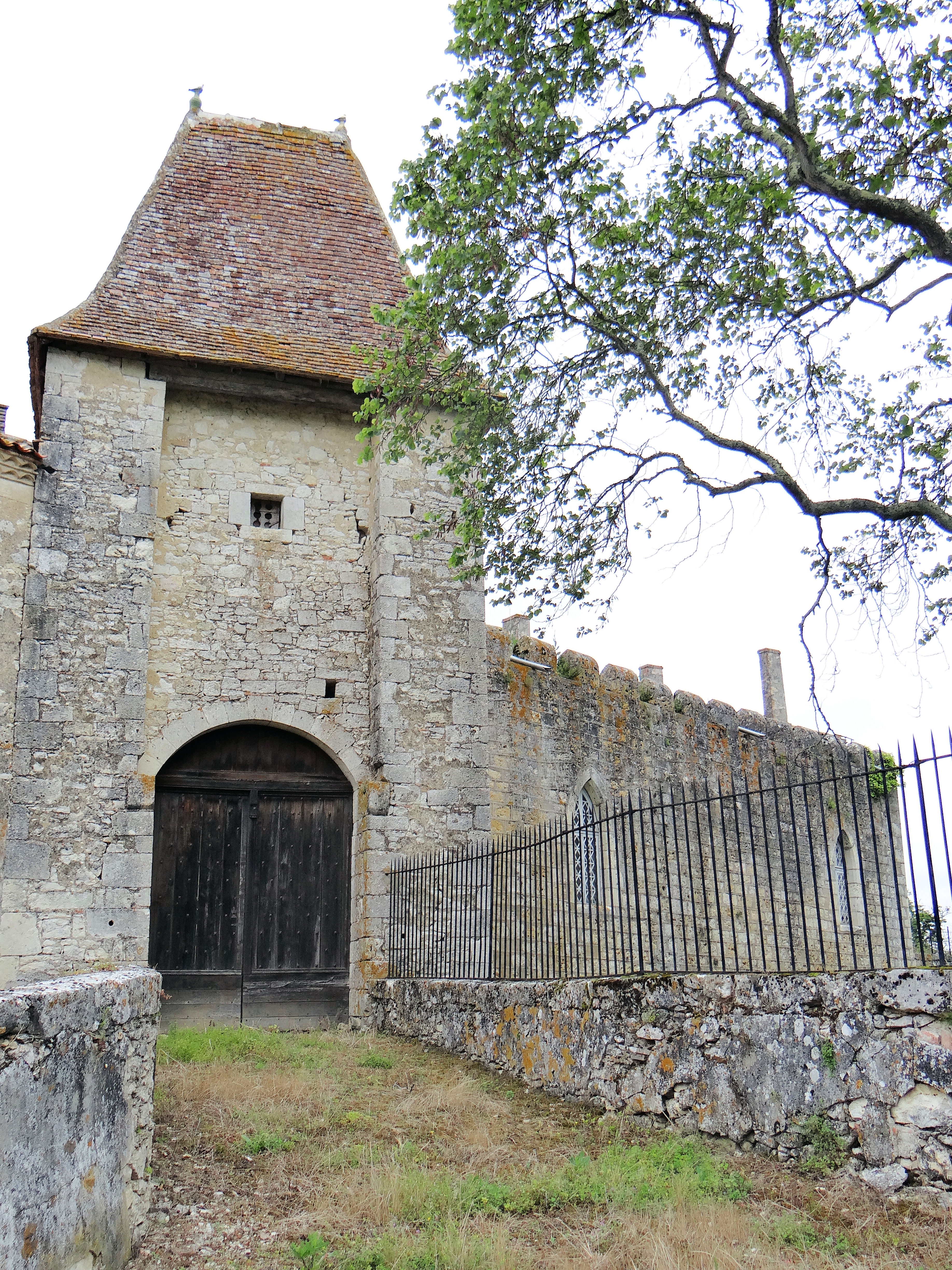 Château d'Avensac - Porche d'entrée